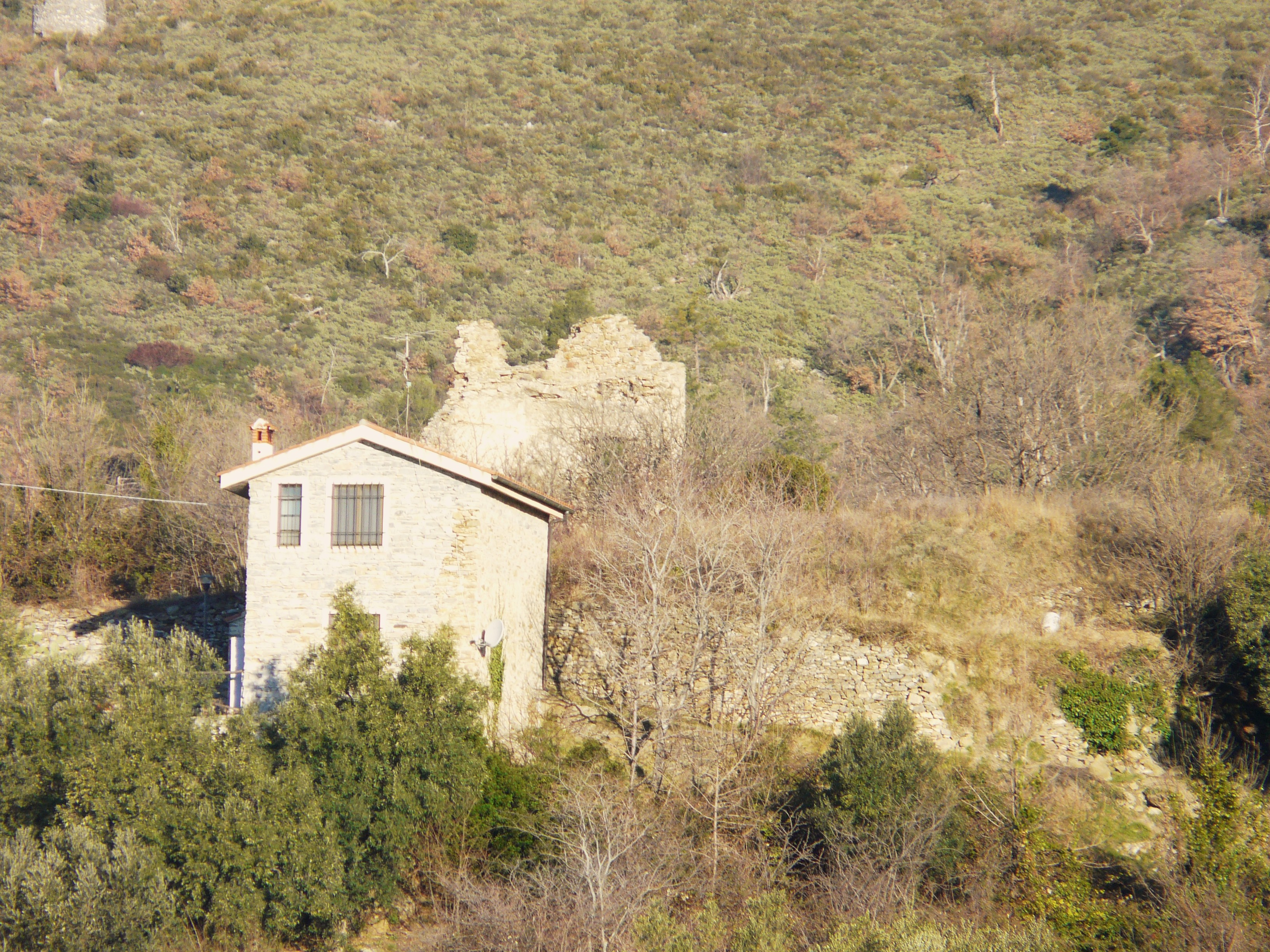 Ruderi del castello di Arnasco, Liguria, Italia